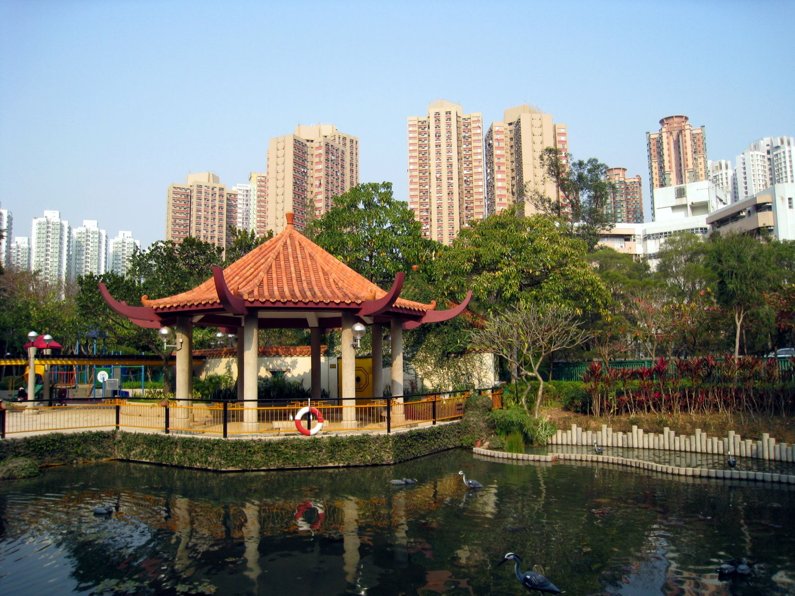 HK Yuen Chau Kok Park Water Scenic